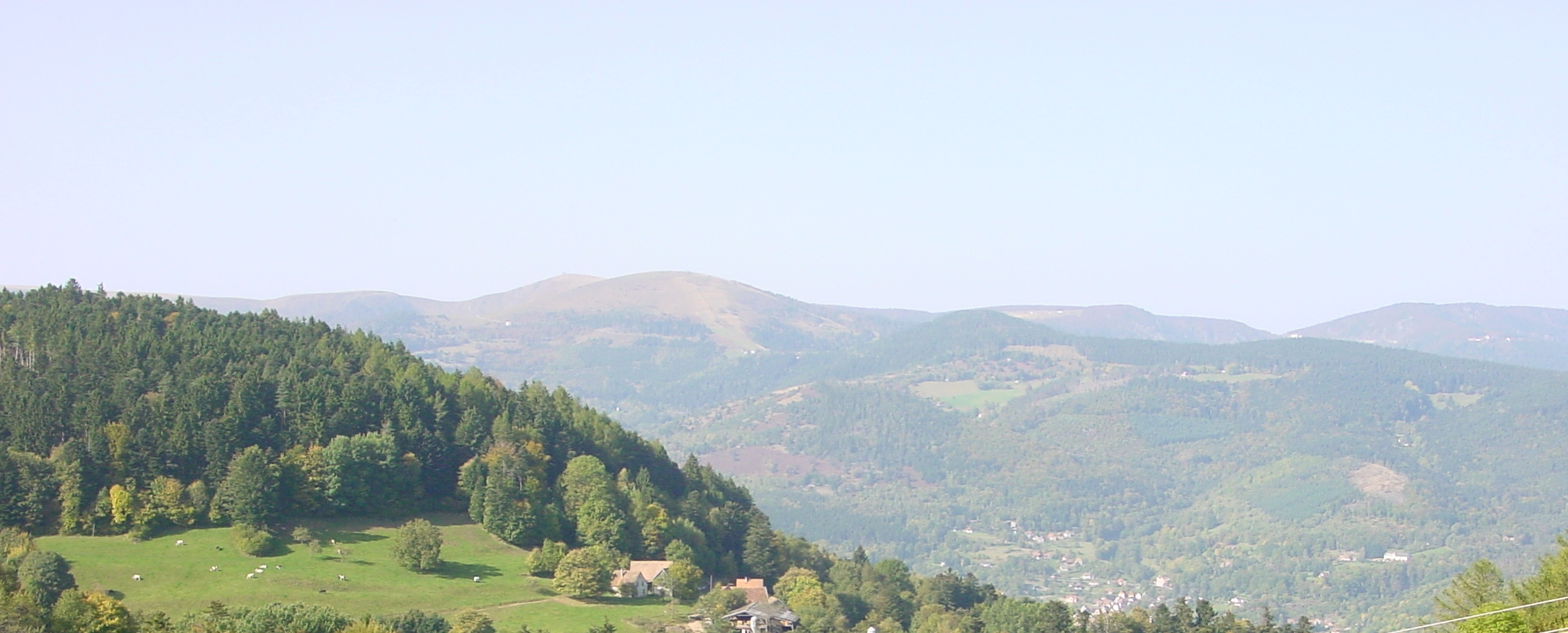 Hohneck von Südosten